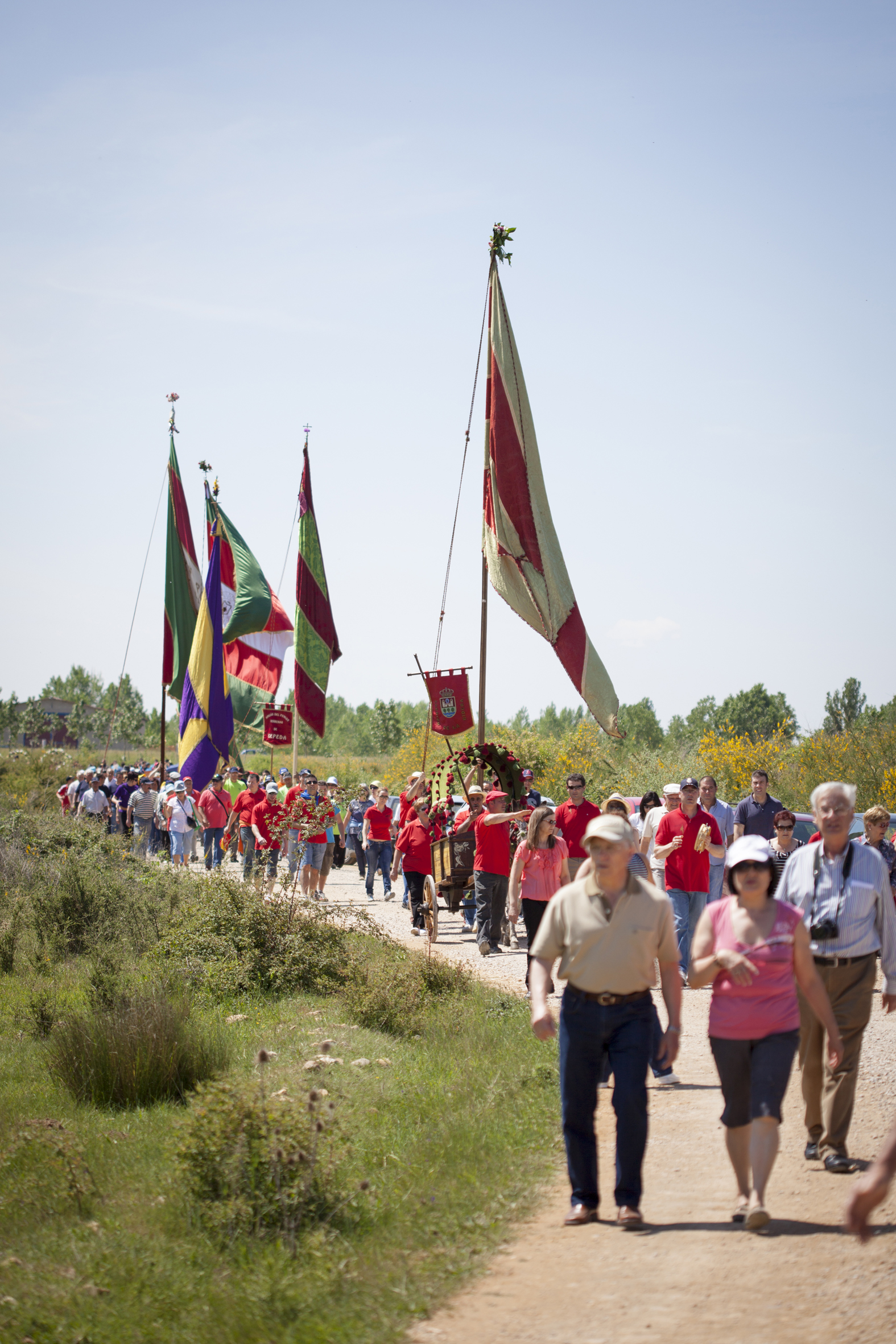 Romería de Nuestra Señora de la Virgen del Villar en Carrizo de la Ribera, León, España. Martes de Pentecostés. 2012 This is a photography of a Folklore festival in Spain (Wikidata id Q26756828).